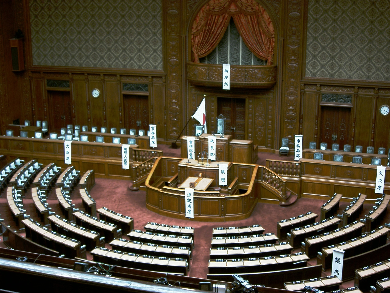 東京都千代田区永田町一丁目7番1号 国会議事堂 衆議院議場の画像。 撮影者: DS80s(投稿者本人) 撮影年月: 2007年5月